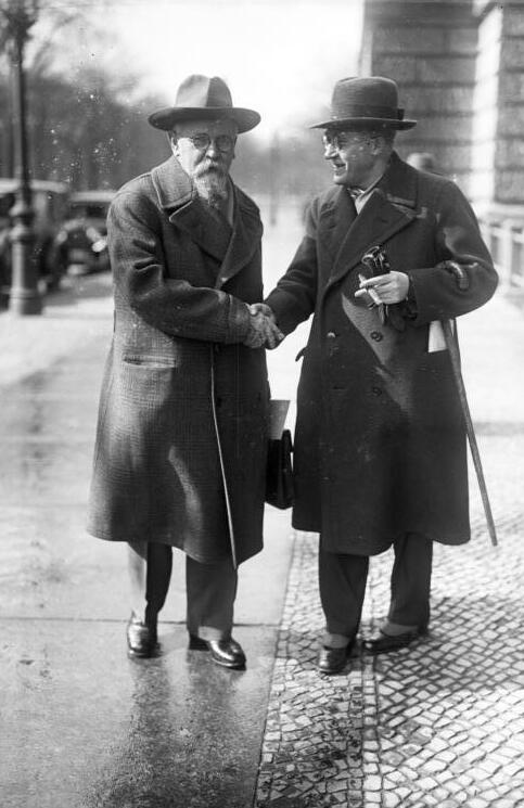 Der Kampf um die Young-Gesetze im Reichstag in Berlin! Die bedeutungsvolle Sitzung, an welcher die Abgeordneten aller Parteien teilnahmen. Der Reichsarbeitsminister Wissel begibt(links) sich zur Lesung der Young-Gesetze in den Reichstag.